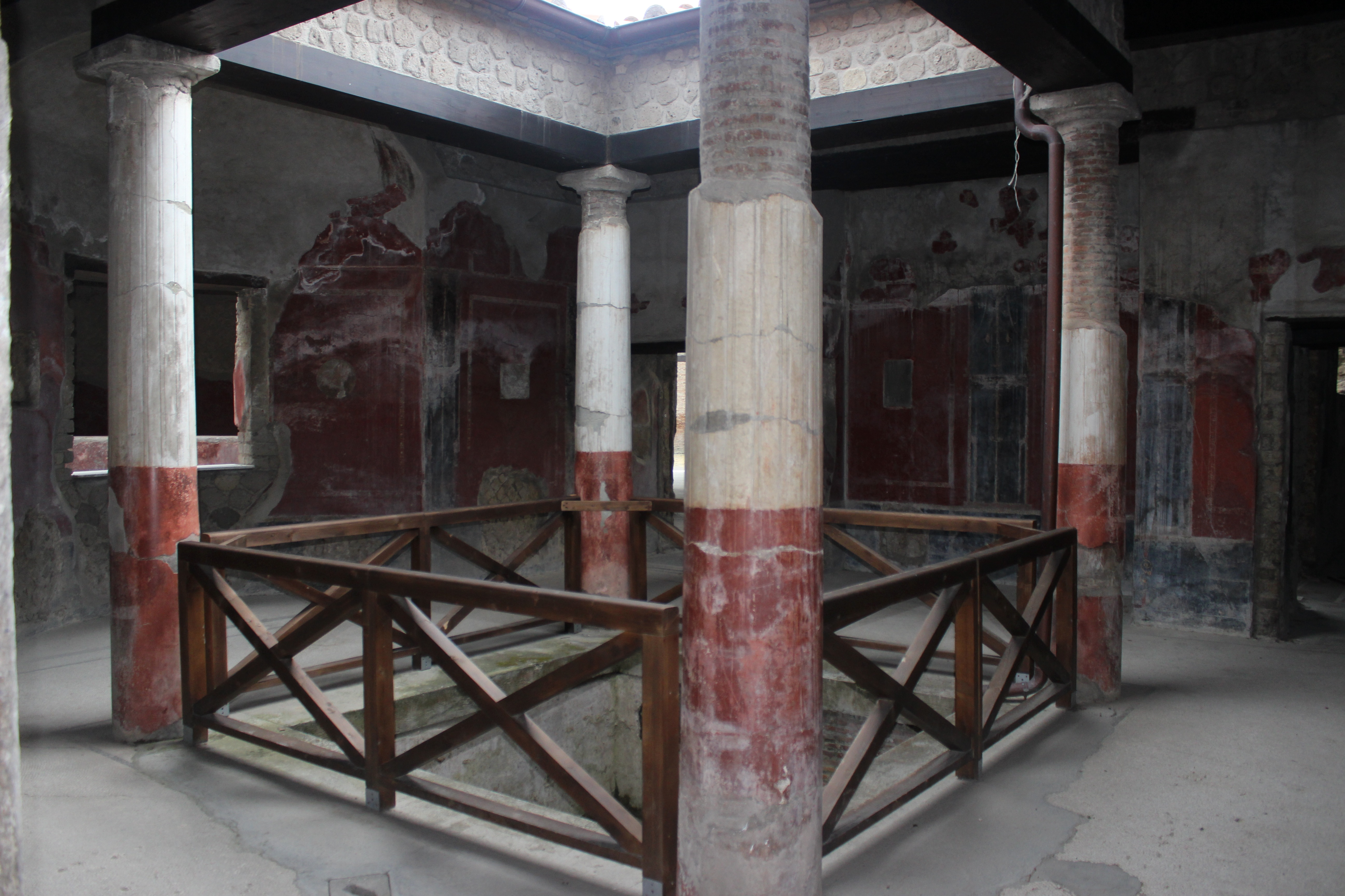 Castellammare di Stabia. Villa San Marco. Termas.